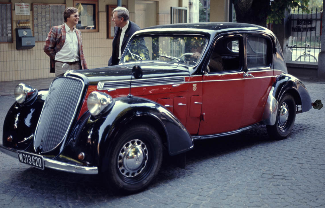 Steyr 220 Limousine 1939